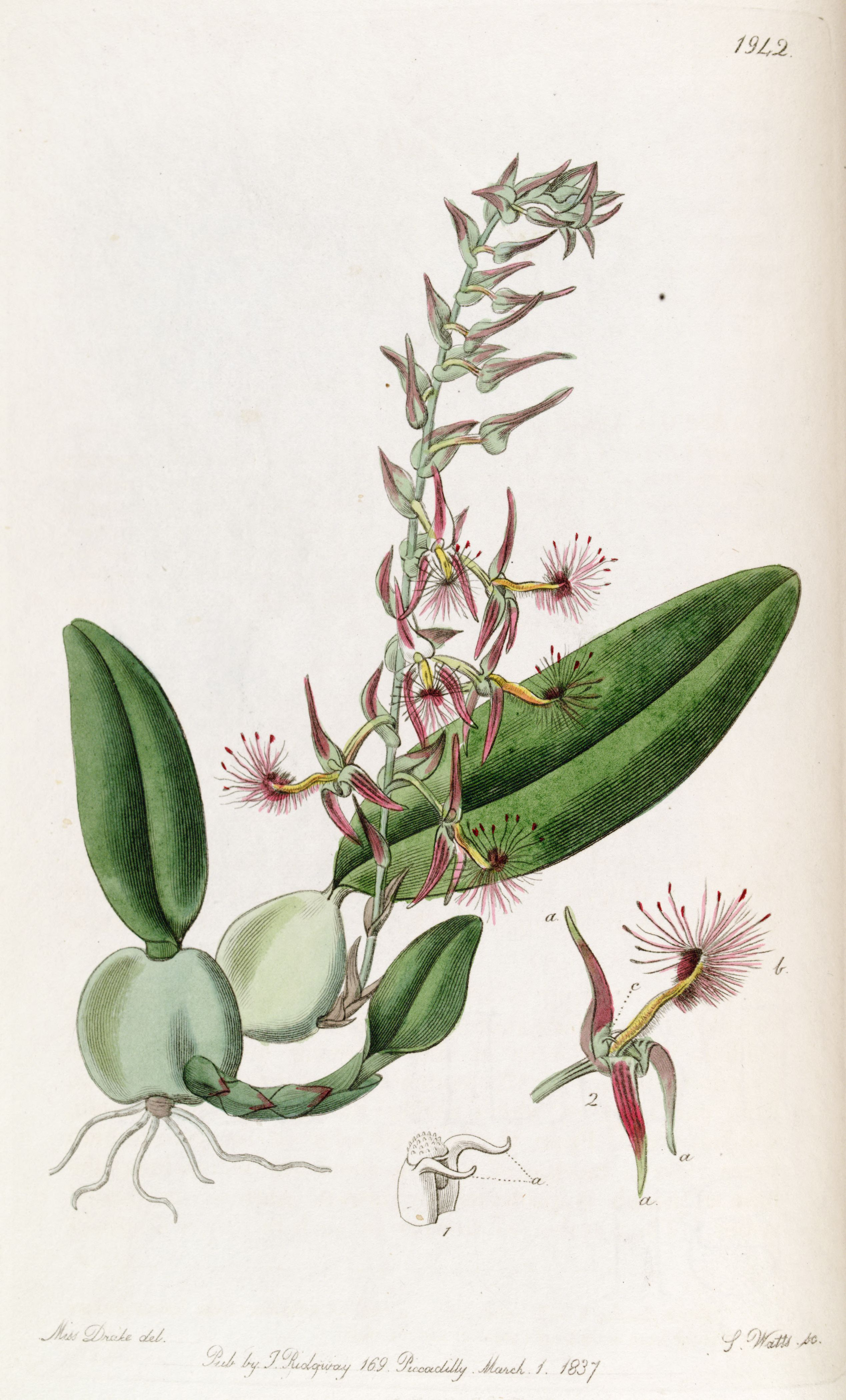 Bulbophyllum barbigerum (spelled Bolbophyllum barbigerum)